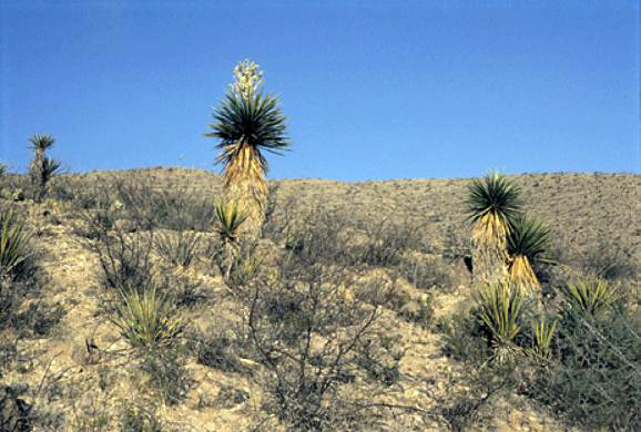 Yucca faxonia; im Vordergrund Yucca torreyi